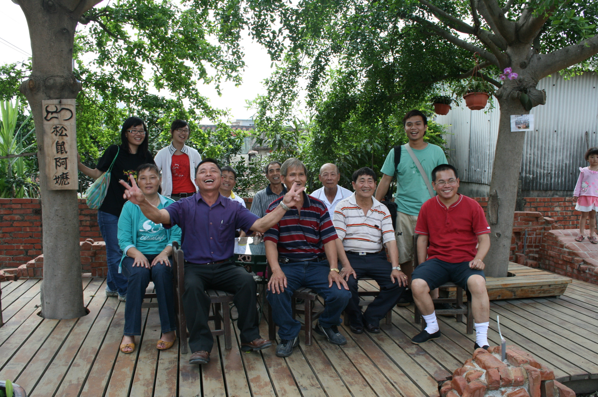 台灣台南縣後壁鄉土溝村社區參訪，照片由cash拍攝，同意由Jasonzhuocn於維基共享網站以PD發布